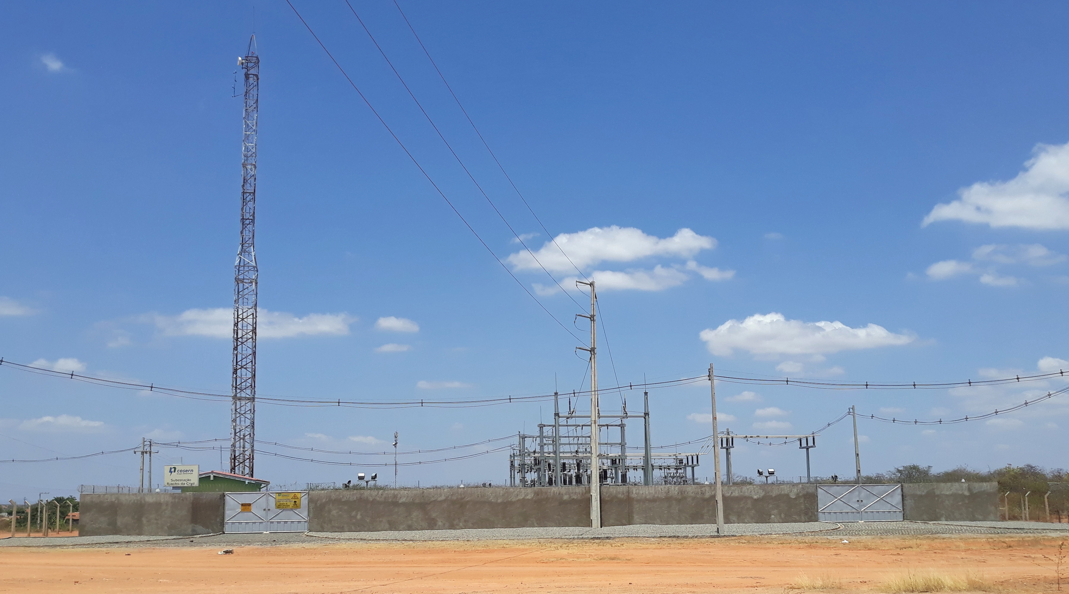 Subestação da Companhia Energética do Rio Grande do Norte em (COSERN) Riacho da Cruz, Brasil